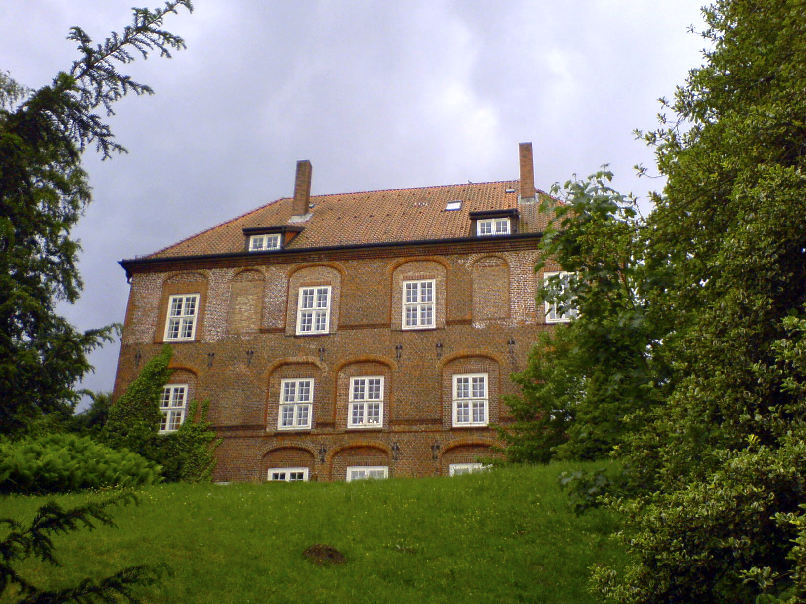 Schloss Agathenburg, Hang